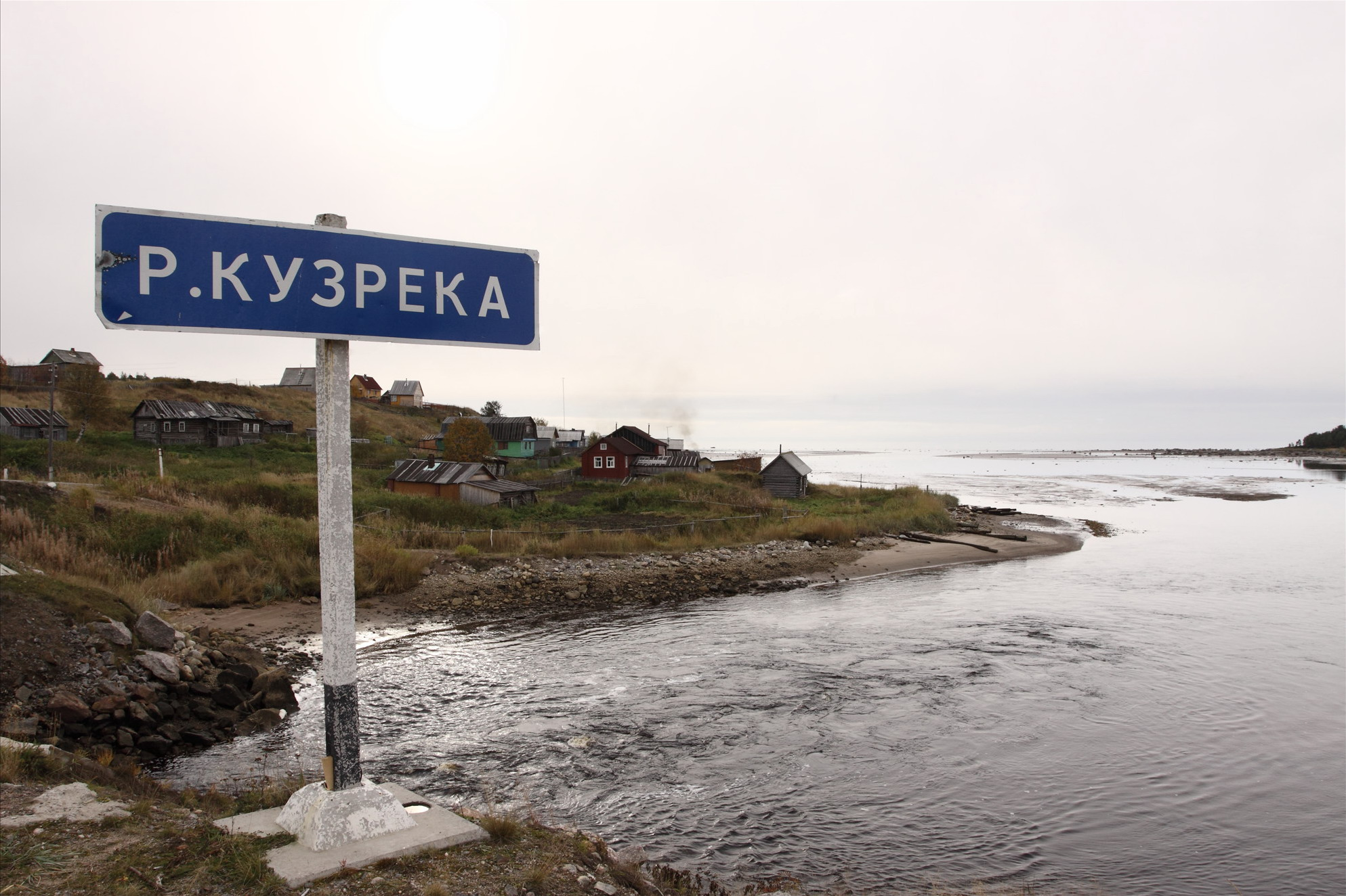 Кузрека у устья